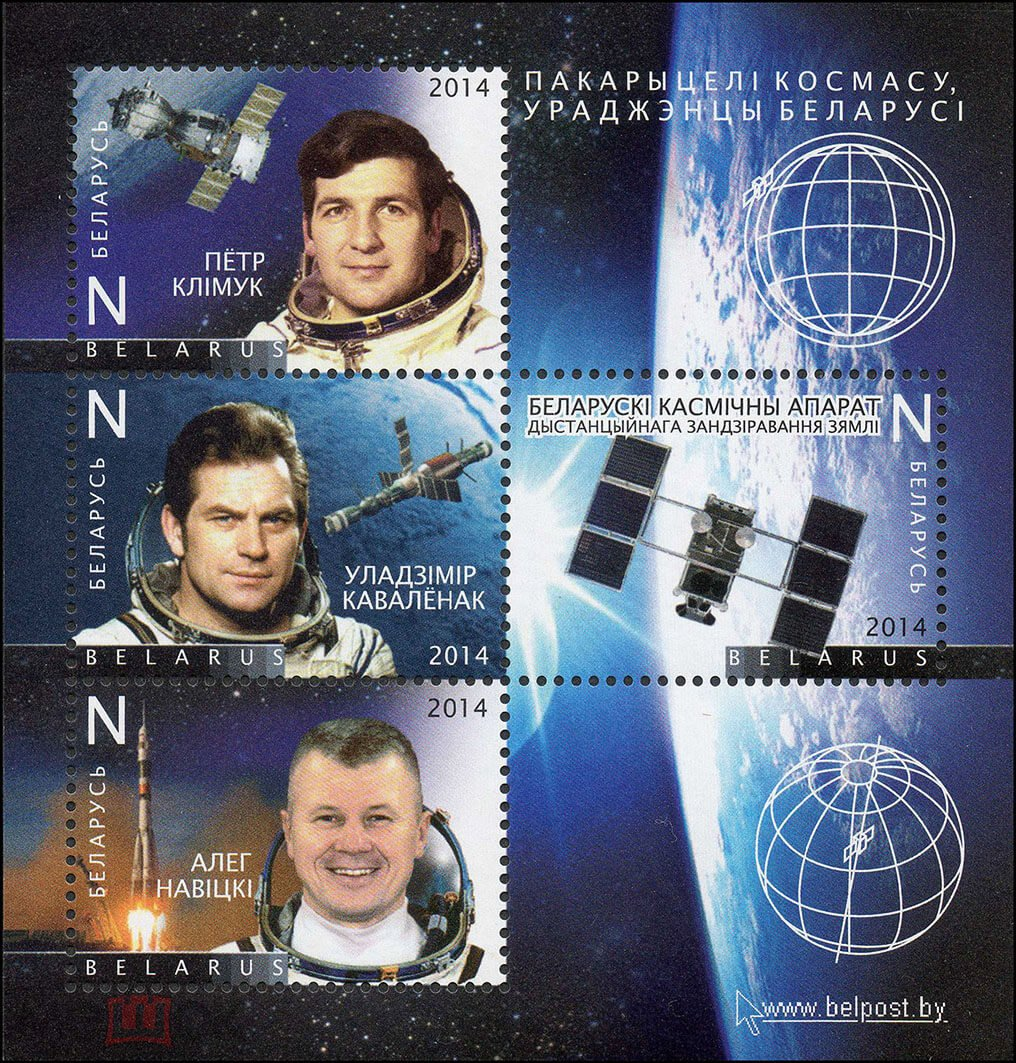 Марка Республики Беларусь. 12.04.2014. "Покорители космоса, уроженцы Беларуси"